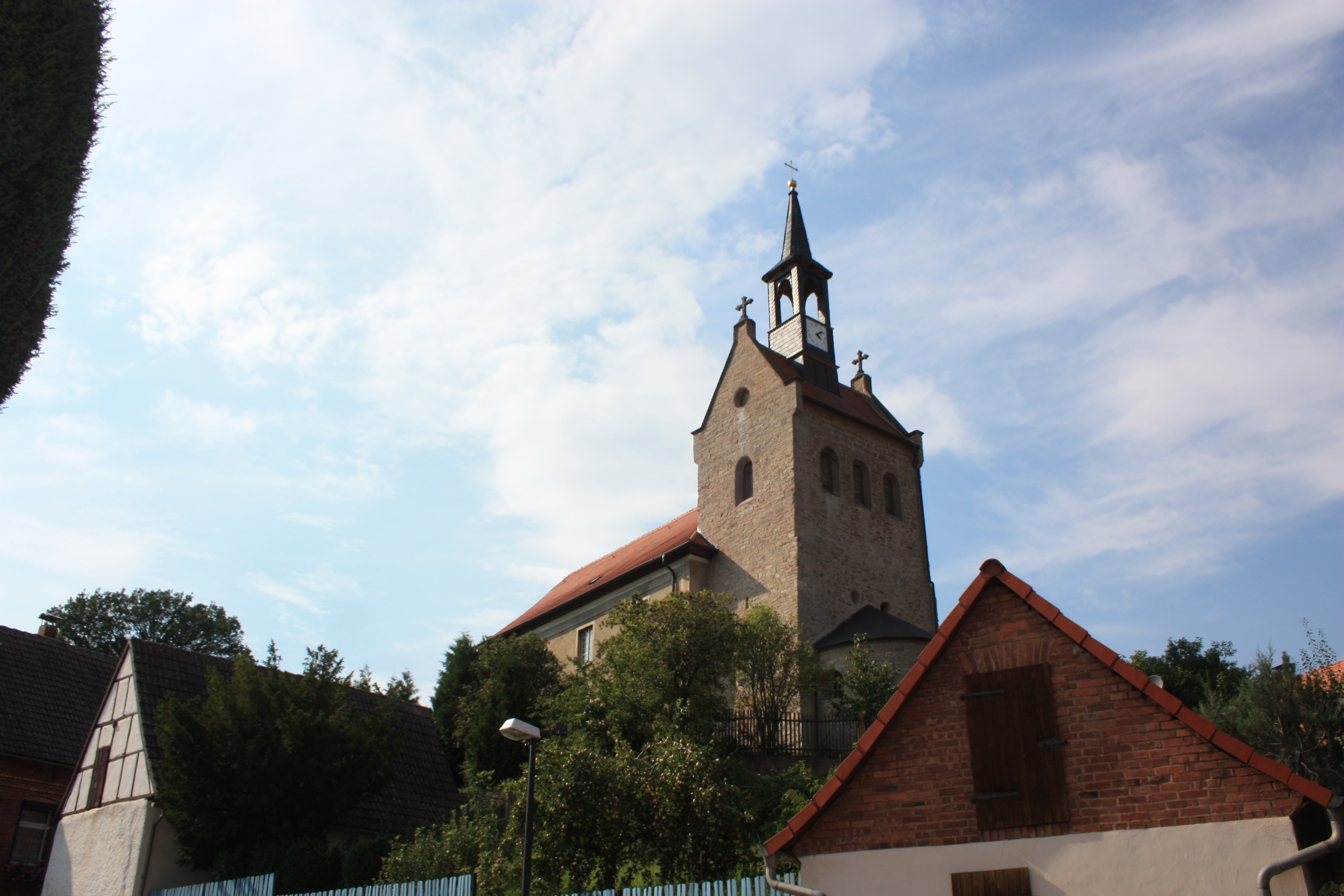 die Dorfkirche von Vatterode